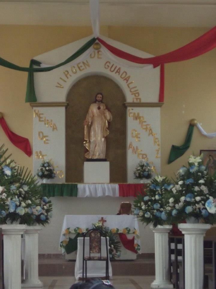 Nuestro patrono